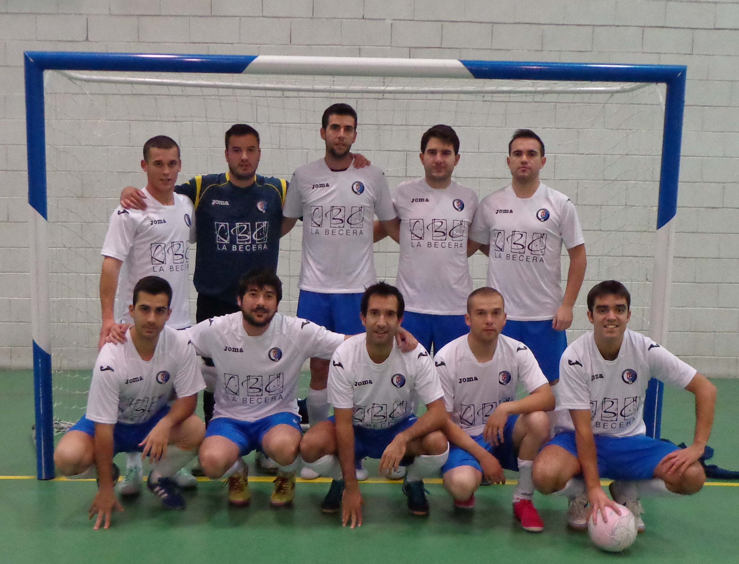 Plantilla CD Muga de Sayago